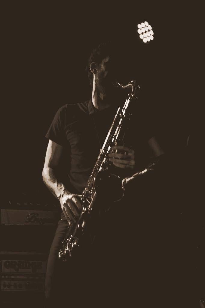 Cosmic Mess, Maus Hábitos 2014 (Porto)